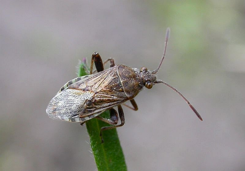 Stictopleurus sp., Gradignan, Gironde, France